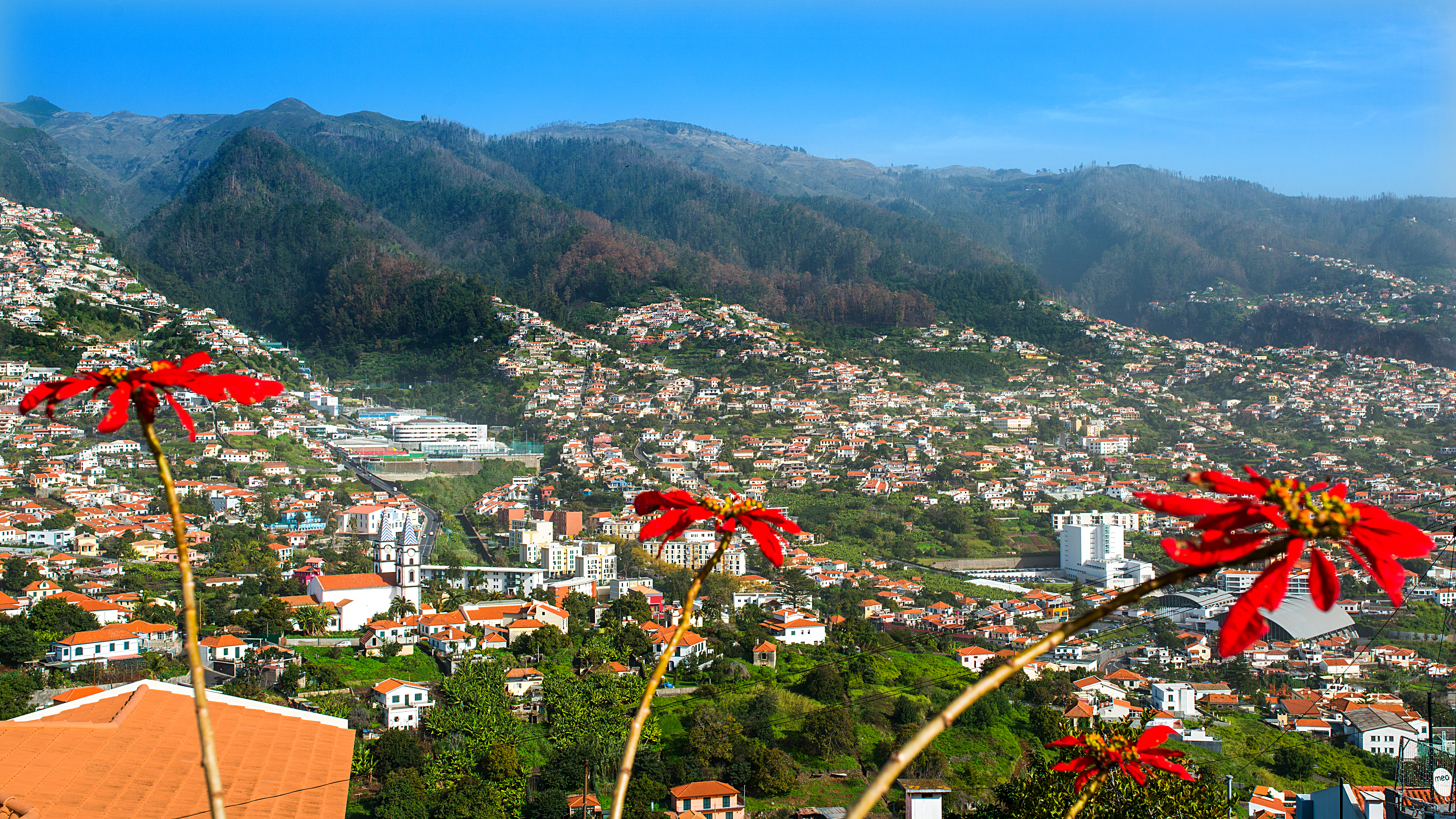 Funchal Madeira Portugal January 2014